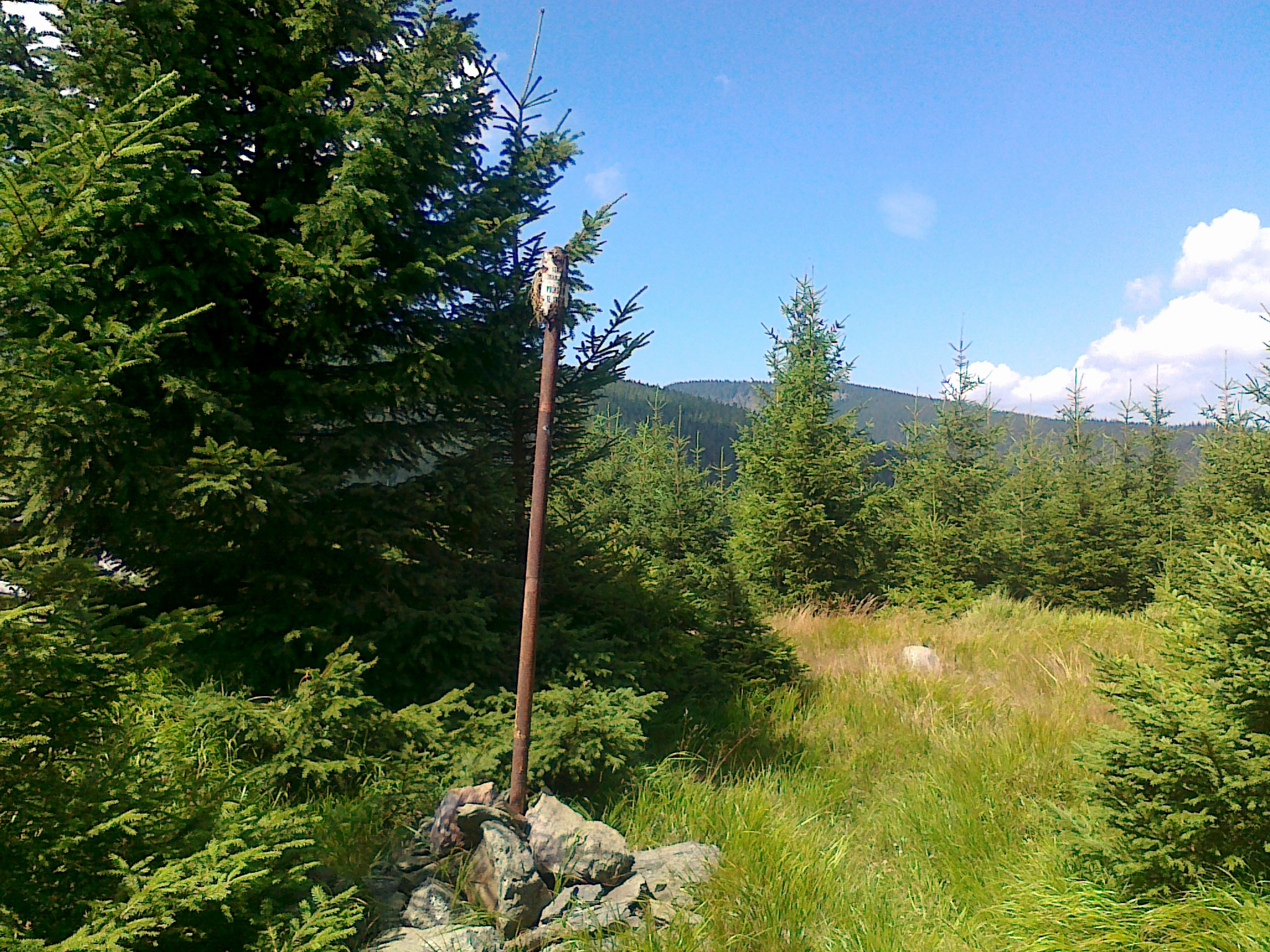 Widok na punkt geodezyjny na szczycie góry Hradečná - 1057 m